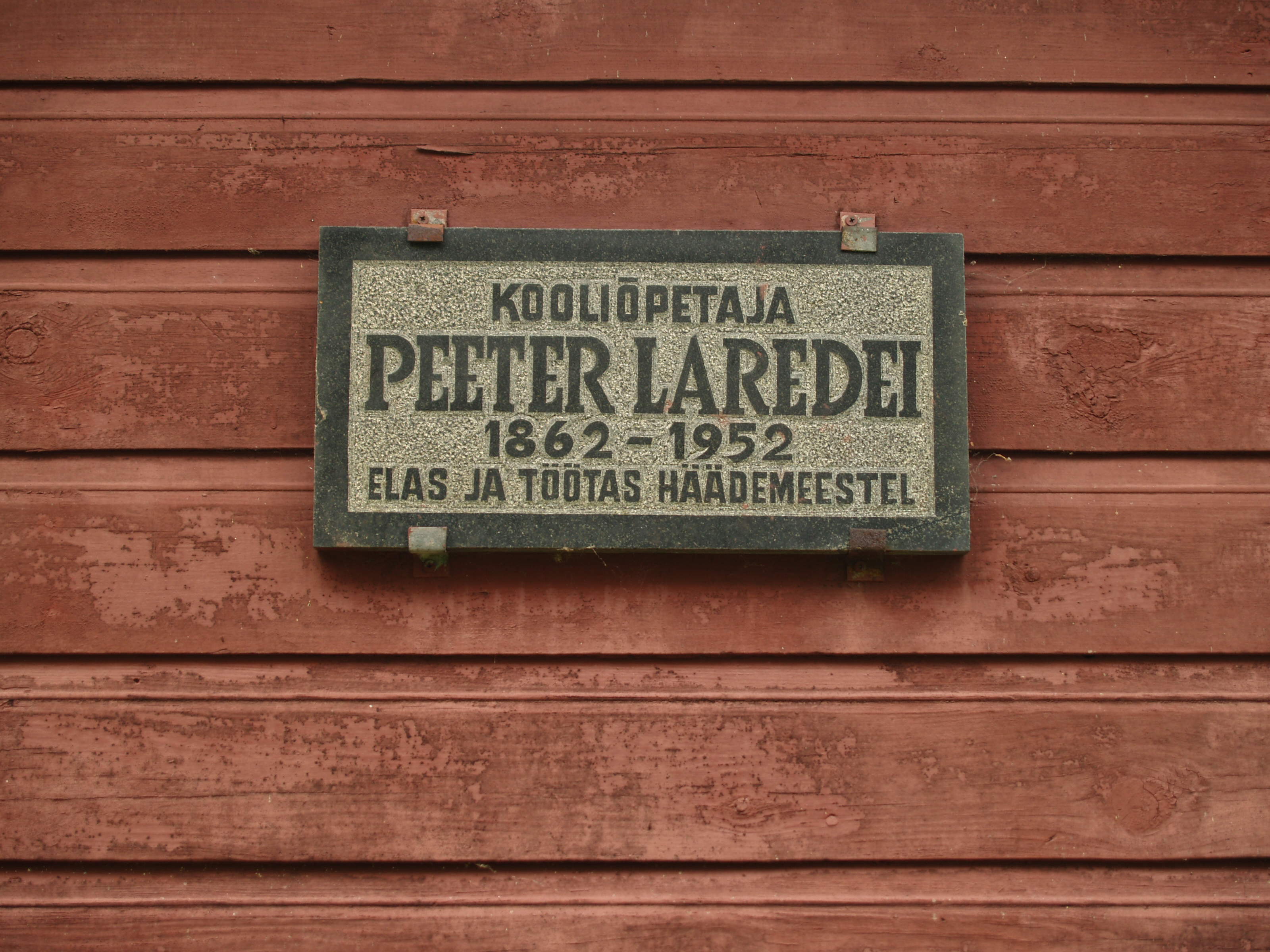 Mälestustahvel Häädemeeste muuseumi seinal.